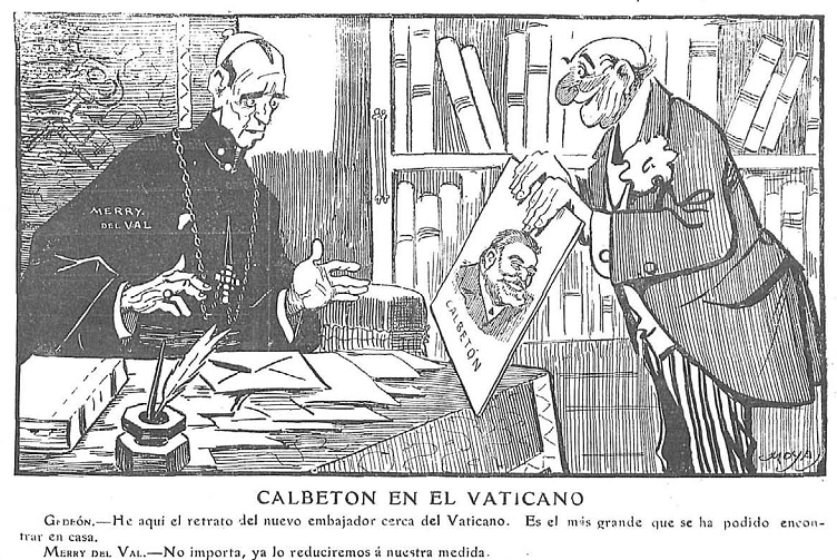 Calbeton en el Vaticano.